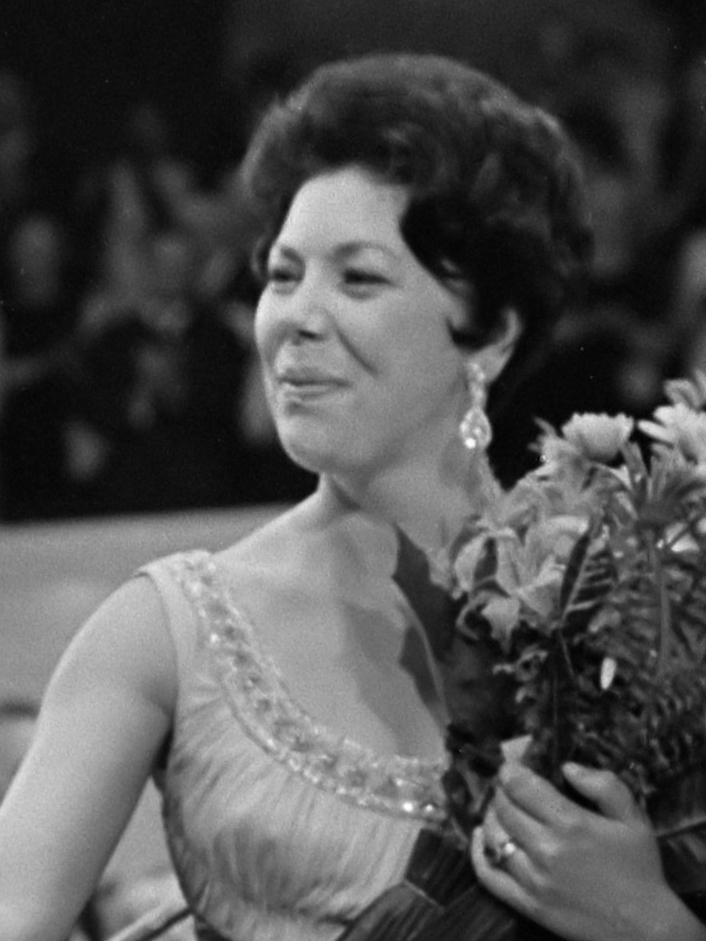 Grand Gala du Disque Klassiek . Nummer 3a Janet Baker ontvangt bloemen 6 oktober 1967